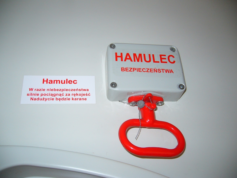 Hamulec bezpieczeństwa w w wagonie PKP Przewozy Regionalne